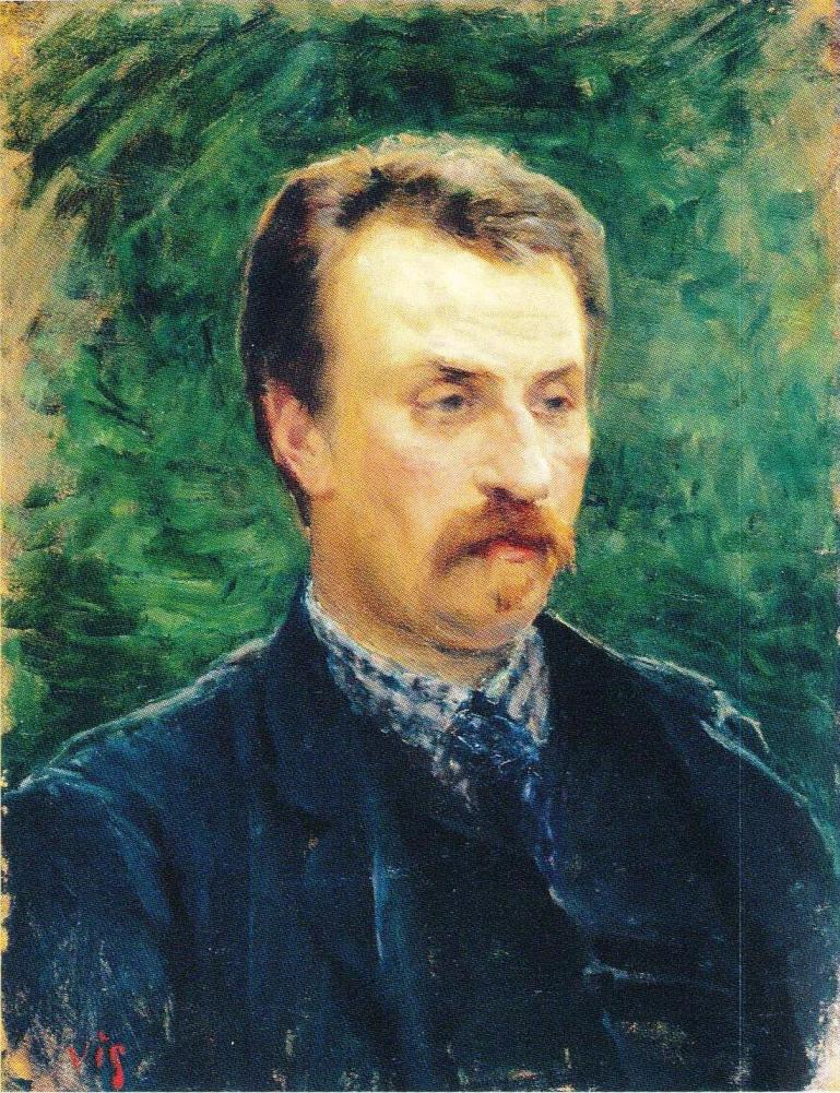 Kirjailija Juhani Aho (Johan Brofeldt), Venny Soldanin maalaama muotokuva. Maalaus lienee valmistunut hieman ennen kuin Aho ja Soldan menivät naimisiin syyskuussa 1891.